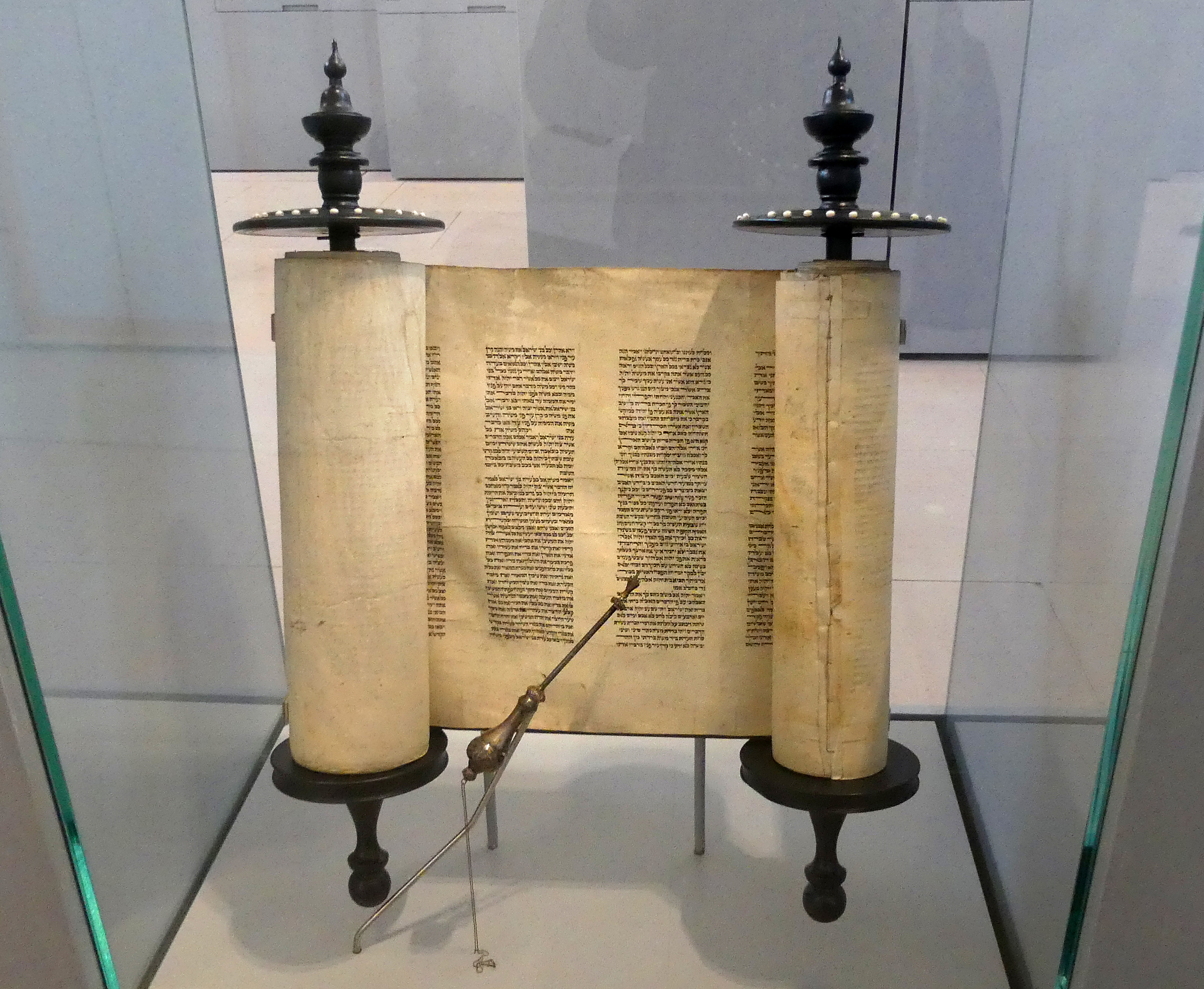 Tora-Rolle aus der Synagoge aus Groß-Umstadt im Hessenpark